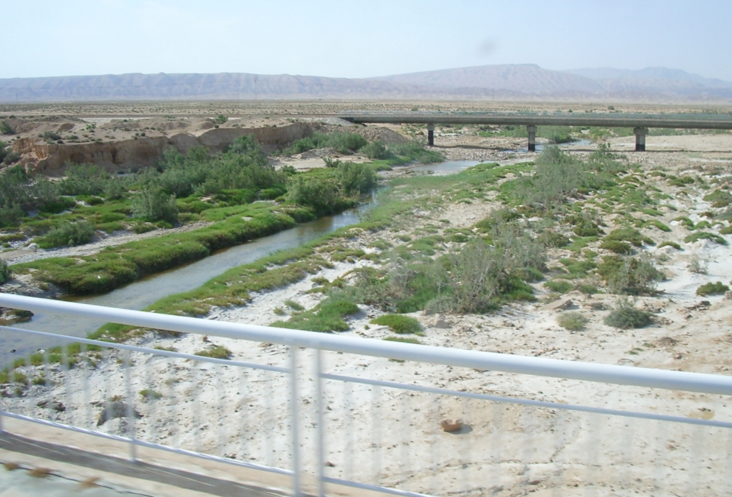 Oued El Melah